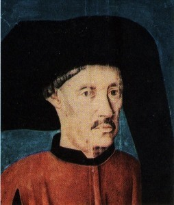 Prins-Hendrik-die-Seevaarder